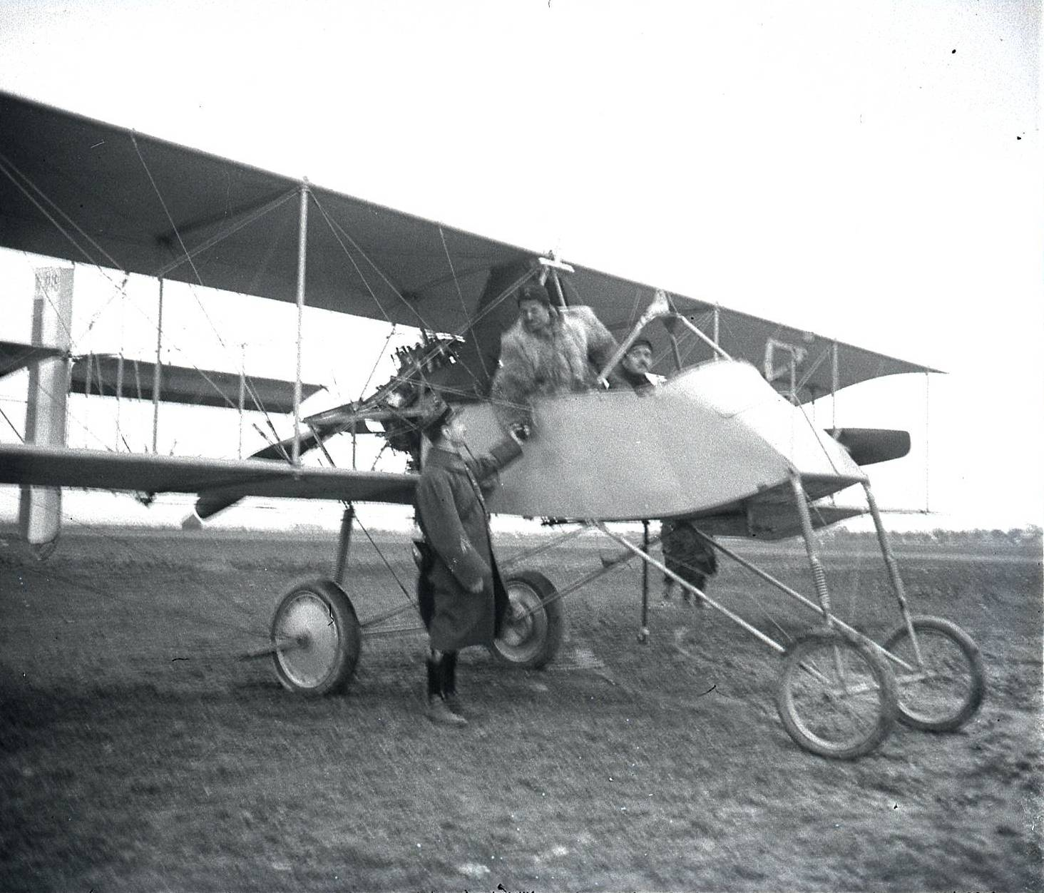 Vue d'un avion biplan Voisin III et de trois militaires sur une piste de décollage à Amiens (Somme). 1915. Guerre 1914-1918. Deux militaires sont dans l'engin un autre est au sol.